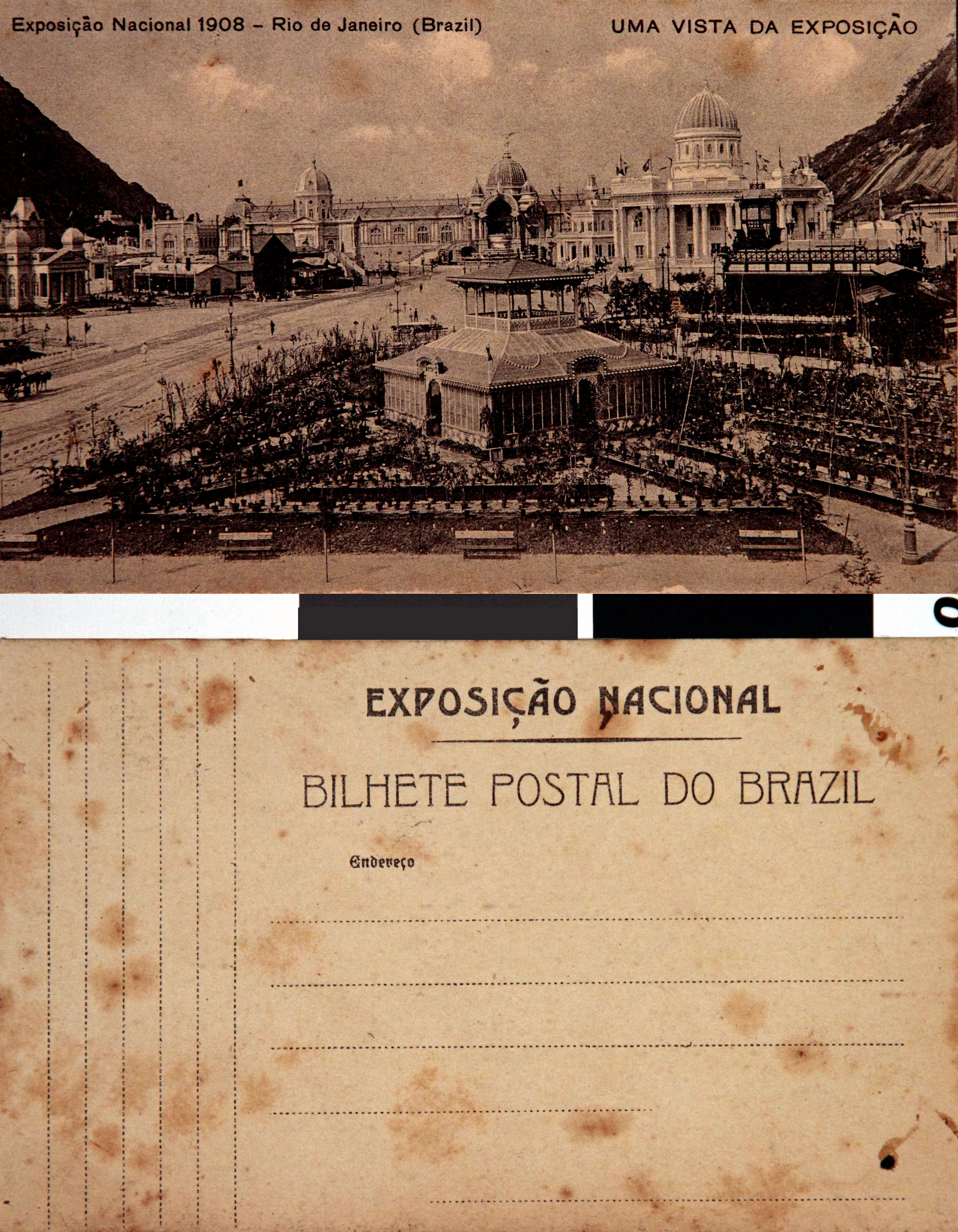 Realizada na Praia Vermelha, no Rio de Janeiro.